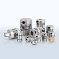 Verschiedene Ausführungen von Federstegkupplungen, verschiedene Anbindungen wie Spreiznaben, isolierende Buchsen oder Klemmnaben.